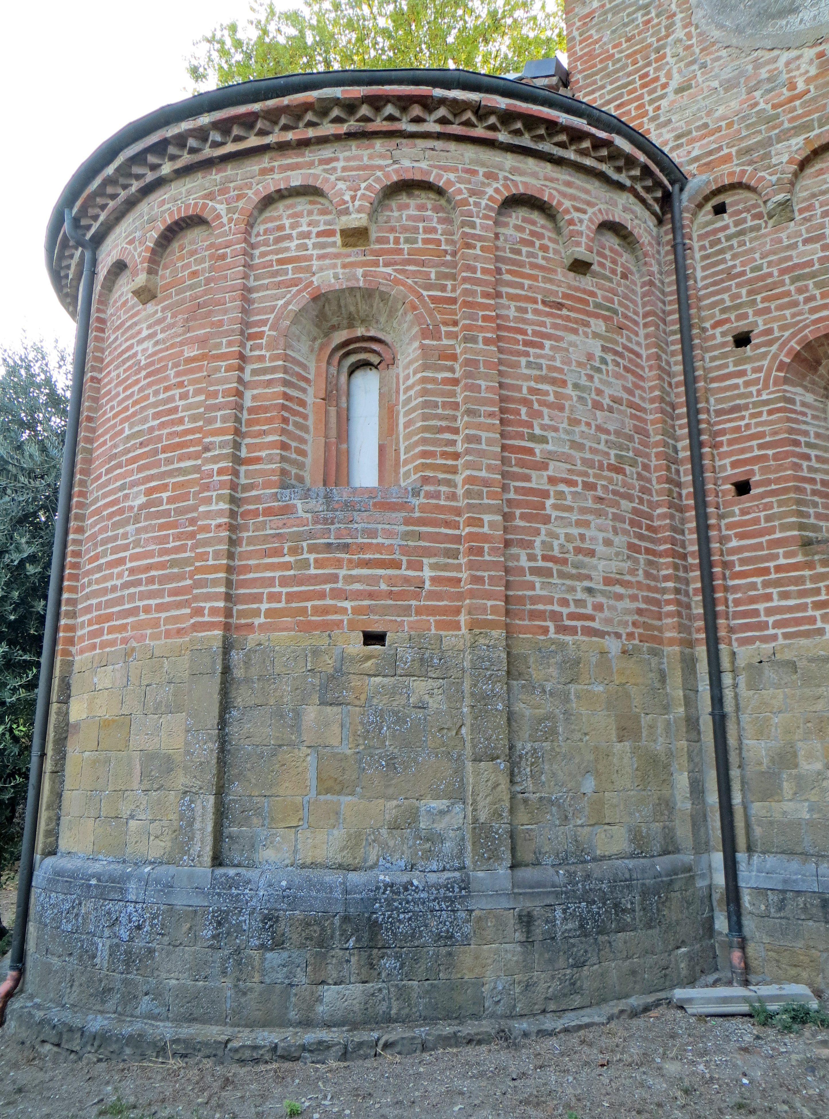 Abside della pieve di San Biagio This is a photo of a monument which is part of cultural heritage of Italy.